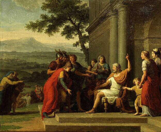 Timoléon à qui les Syracusiens amènent des étrangers